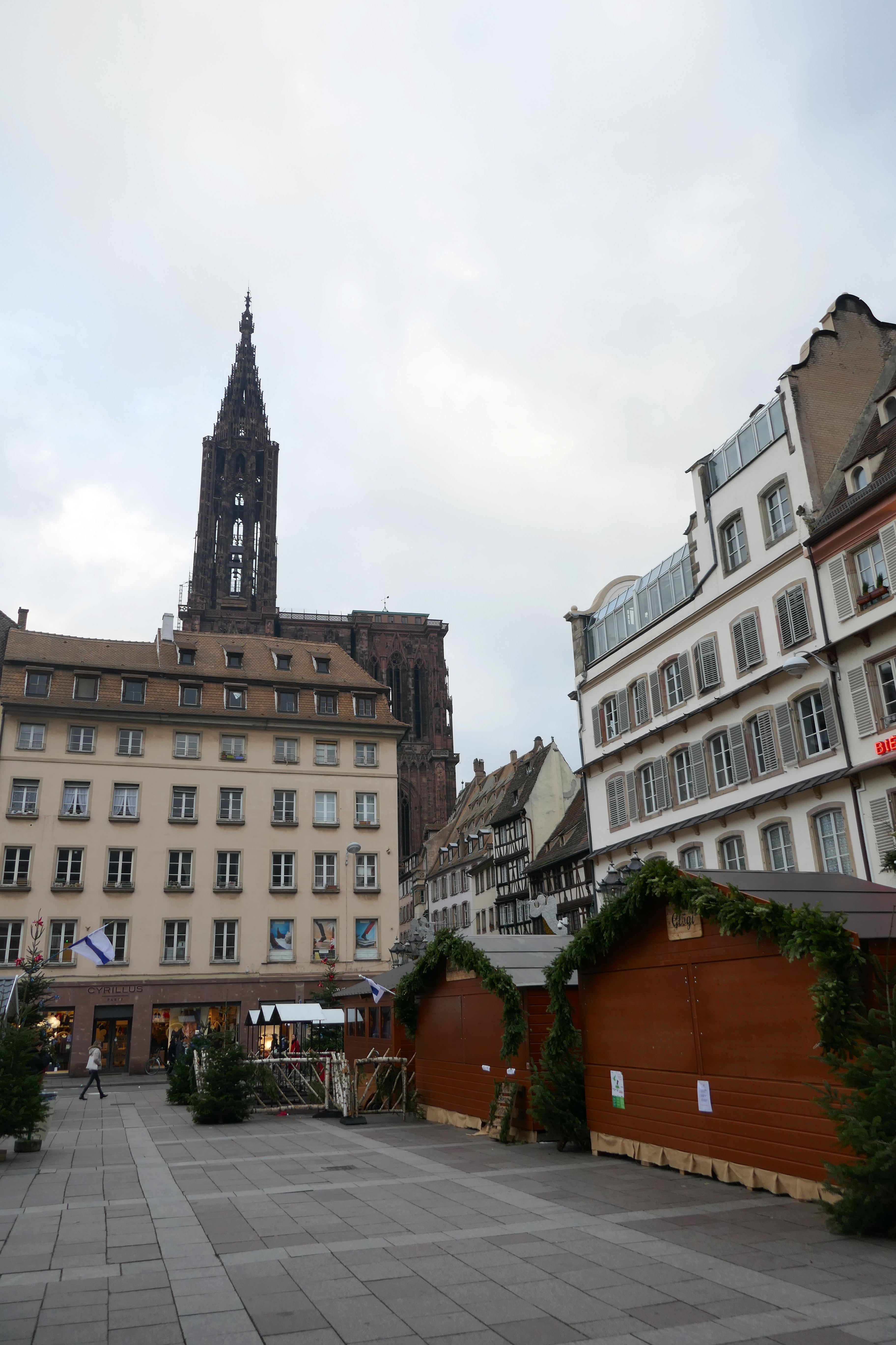 Place Gutenberg à Strasbourg. Marché de Noël fermé le jeudi 13 décembre 2018, à la suite de la fusillade du mardi 11 décembre.